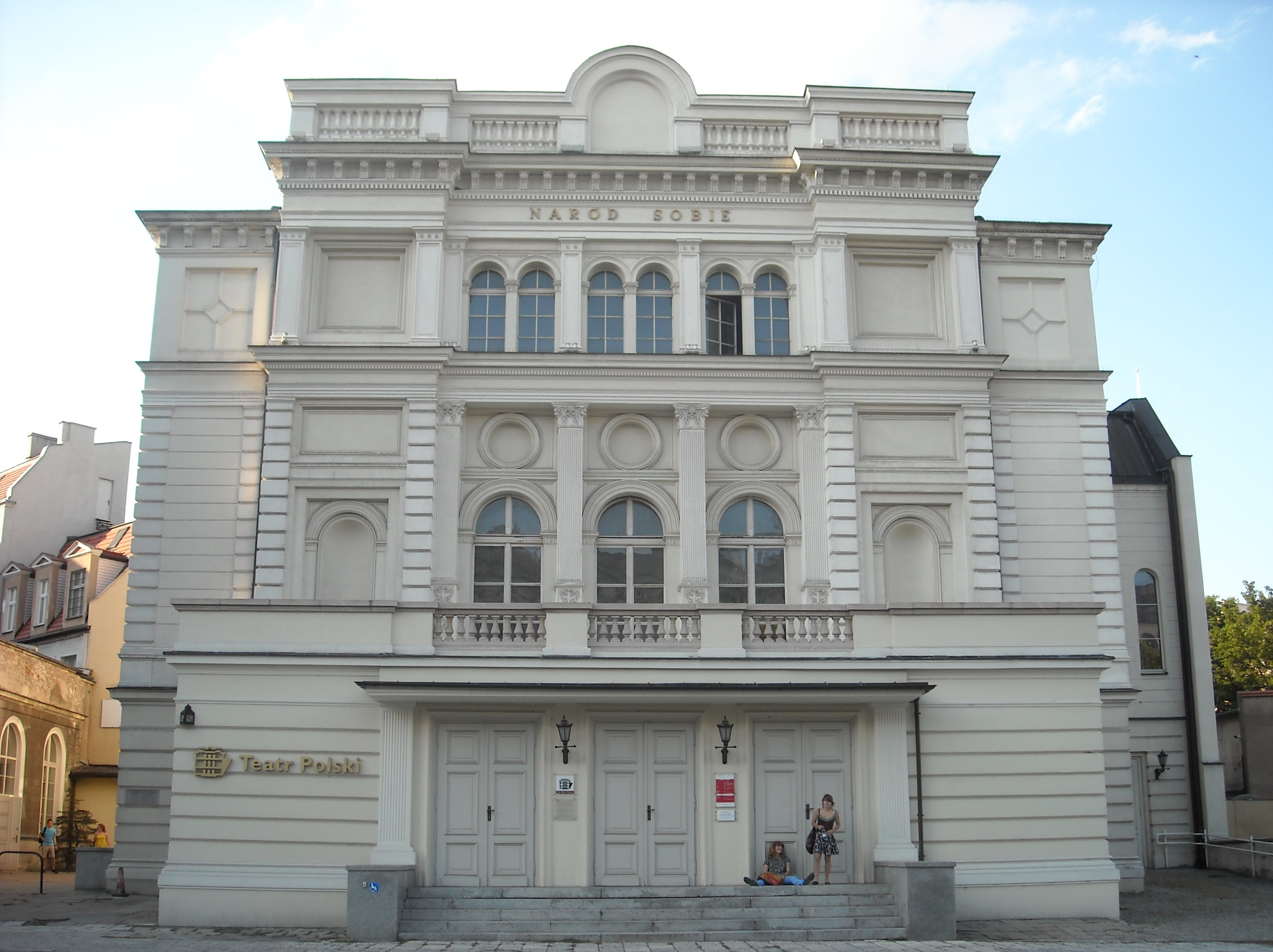 Poznań, Teatr Polski, 1873-75